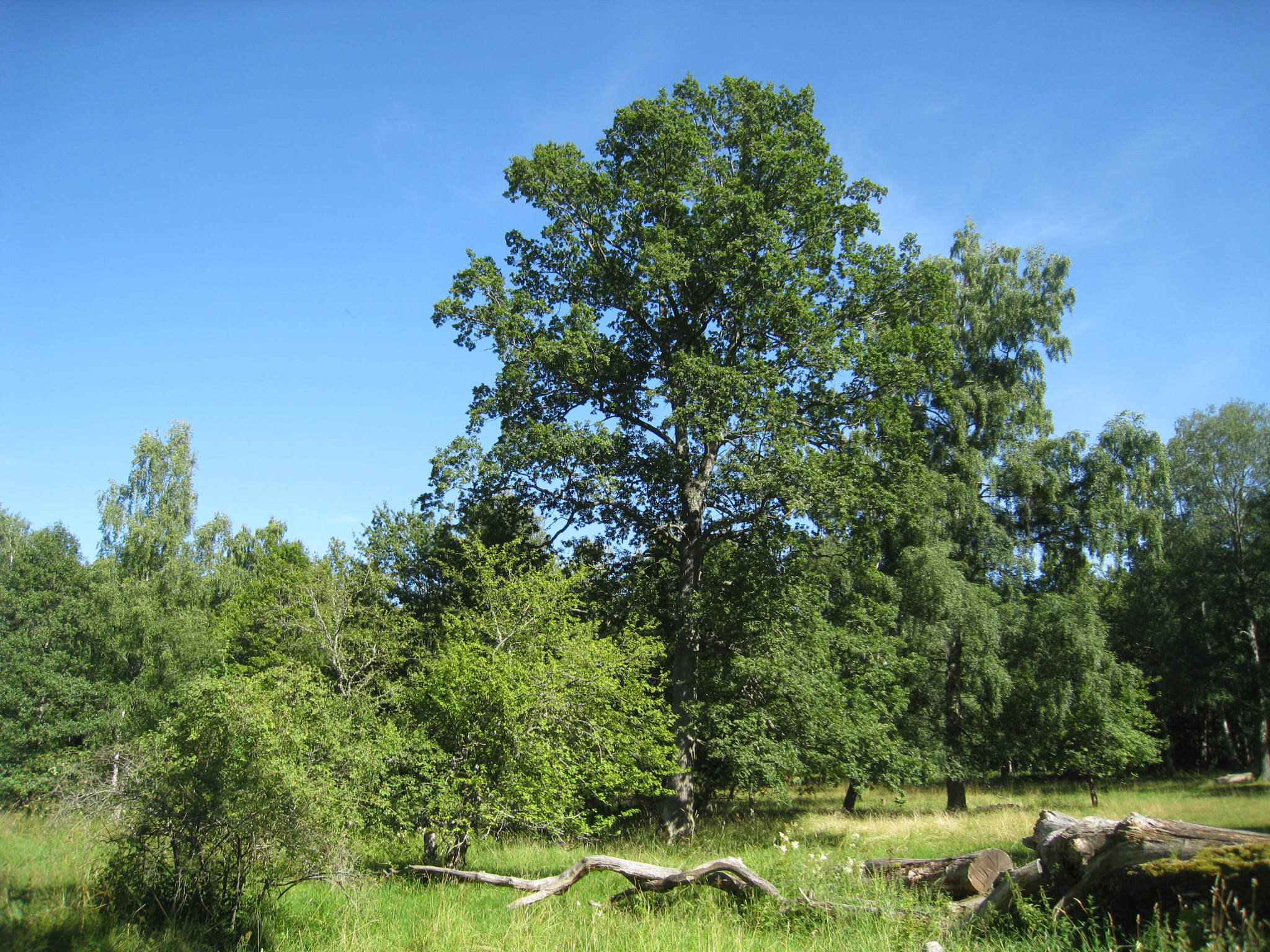 Hummelmora hage i Görvälns naturreservat i Järfälla kommun i Stockholms län.